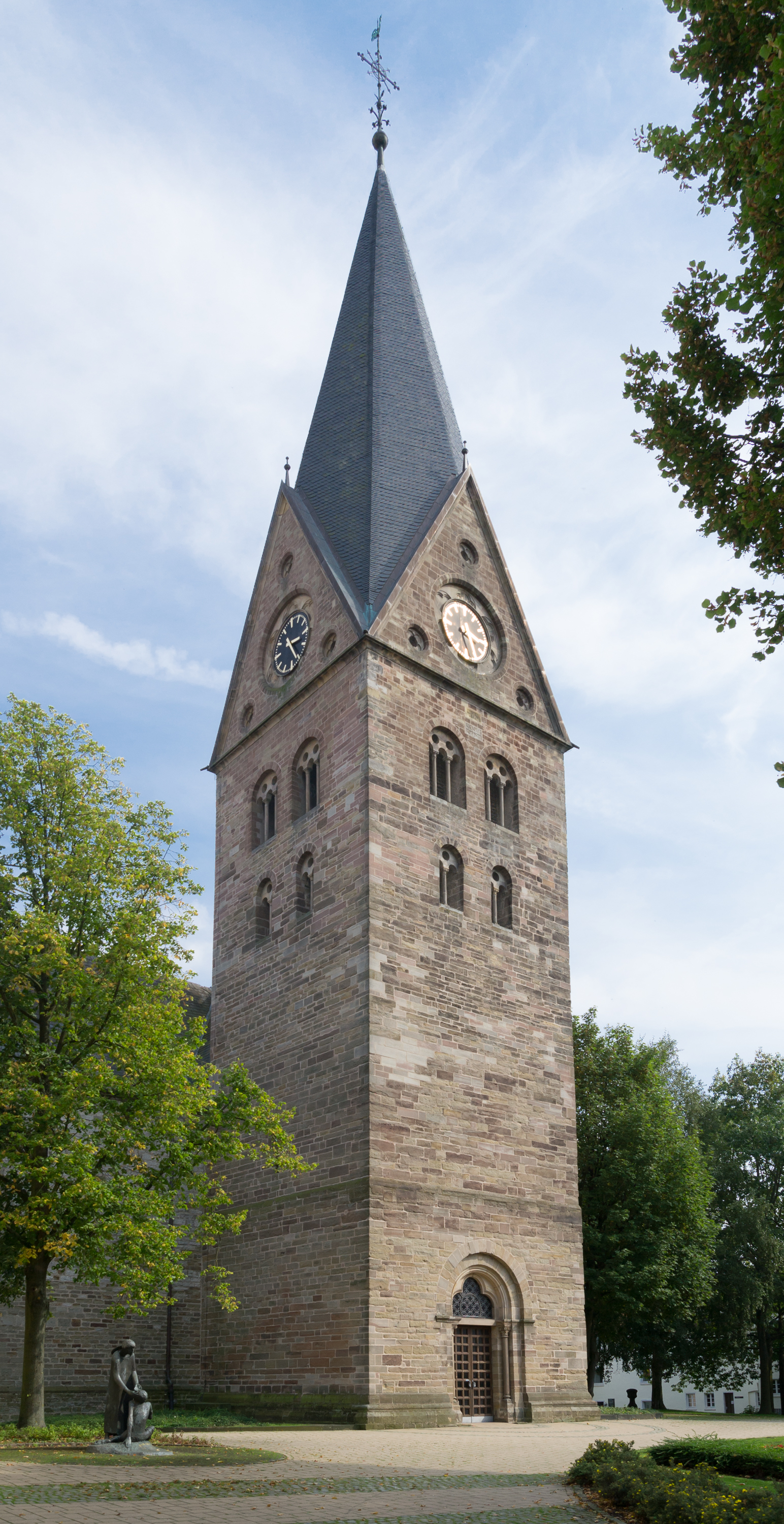 This image shows a heritage building in Germany, located in the North Rhine-Westphalian city Steinheim (Westfalen) (no. 4). Katholische Pfarrkirche St. Marien